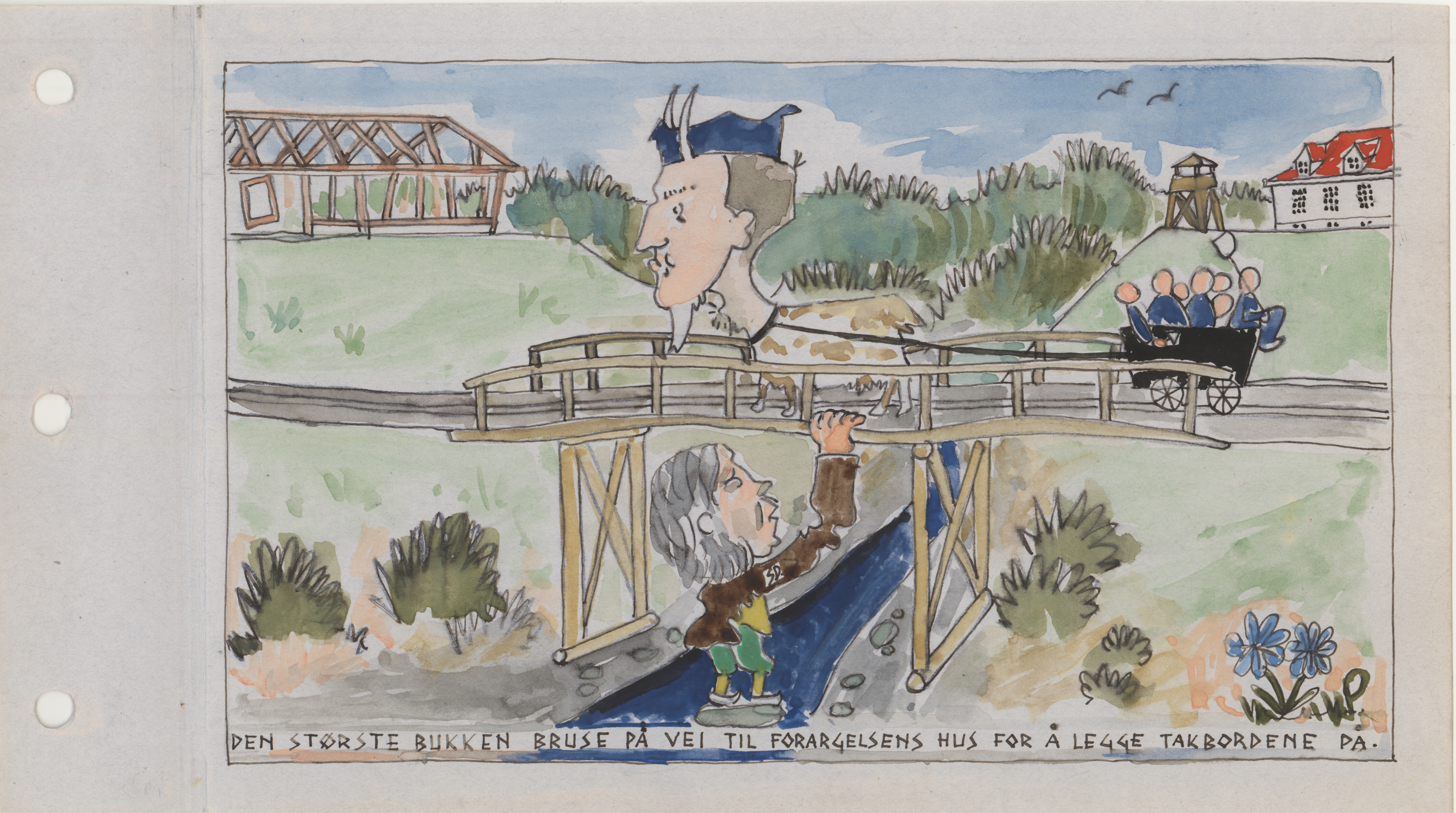 Knut Kuløy var ingeniør, og tilknyttet ei motstandsgruppe på NTH i Trondheim. Han ble arrestert 28. februar 1943 sammen med en rekke andre studenter. Kuløy var flere måneder på Falstad, til han i desember 1943 ble sendt til Tyskland. Han døde i fangeleiren Bergen-Belsen kort tid før frigjøringen.